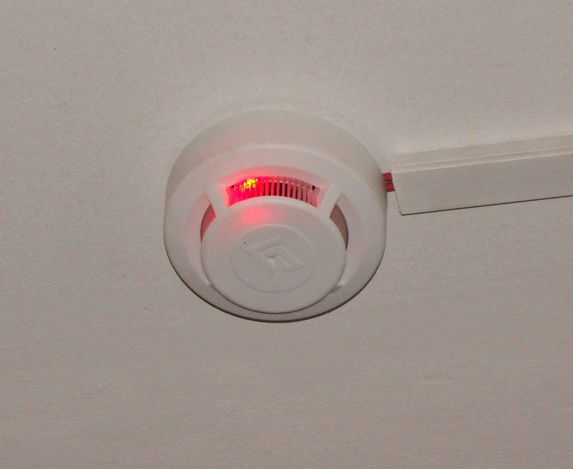 Сработавший дымовой пожарный извещатель